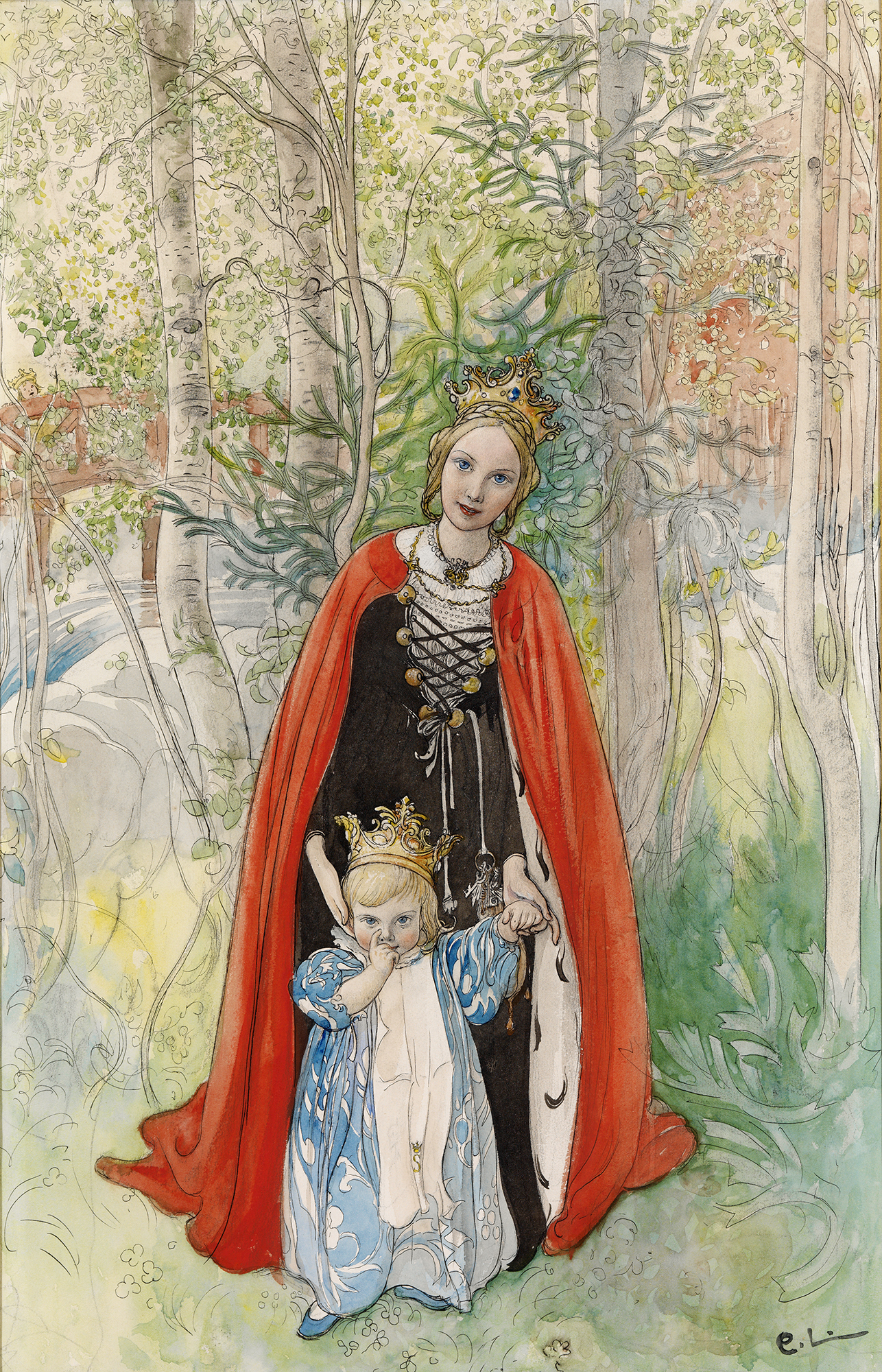 Beställdes av Svensk läraretidnings förlag och publicerades i tidningen Jultomten 1898.